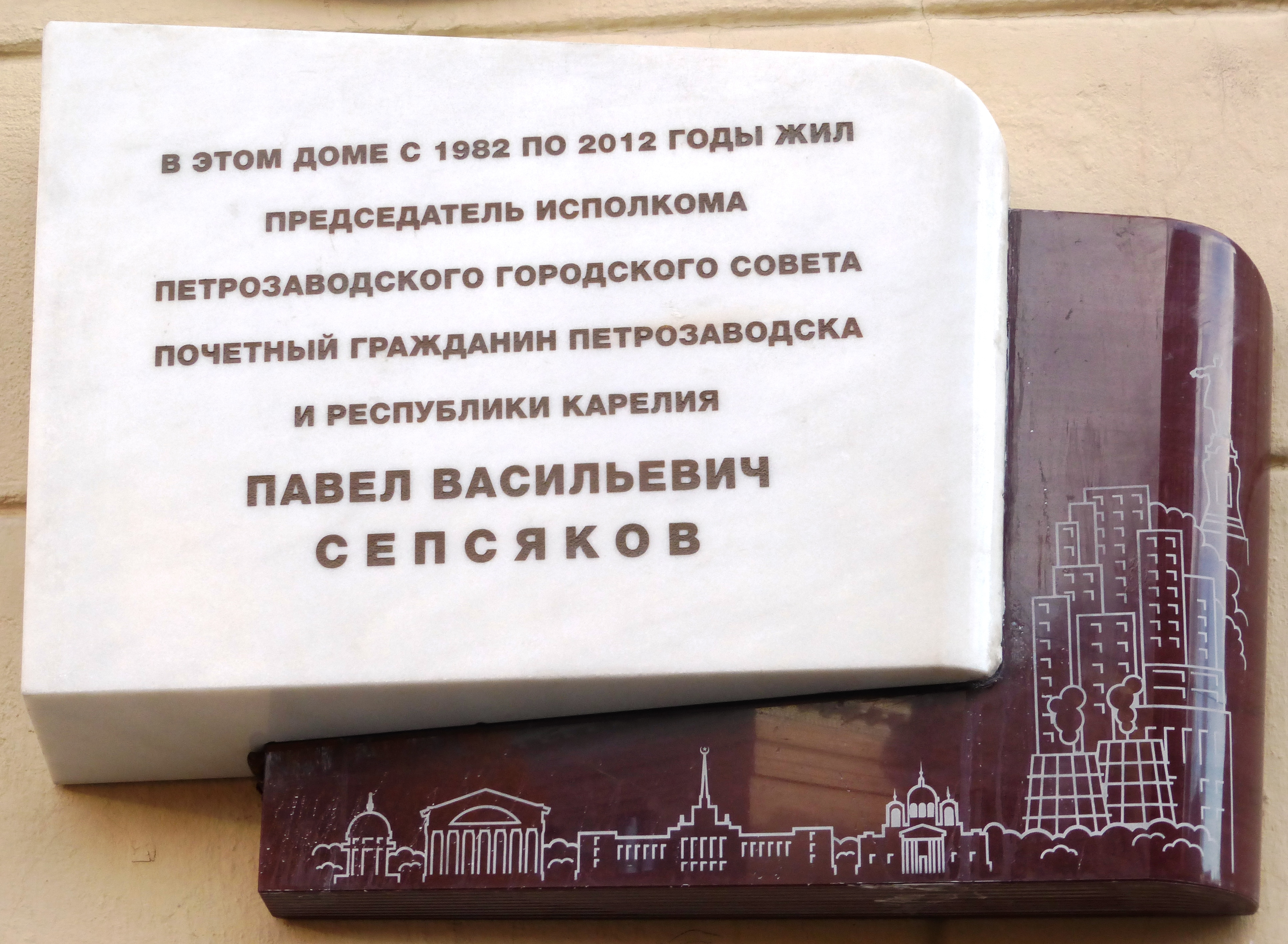 Мемориальная доска Почётному гражданину Петрозаводска Сепсякову Павлу Васильевичу (1925—2012) на здании по ул.Андопова,4 в Петрозаводске. Установлена в октябре 2018 года.